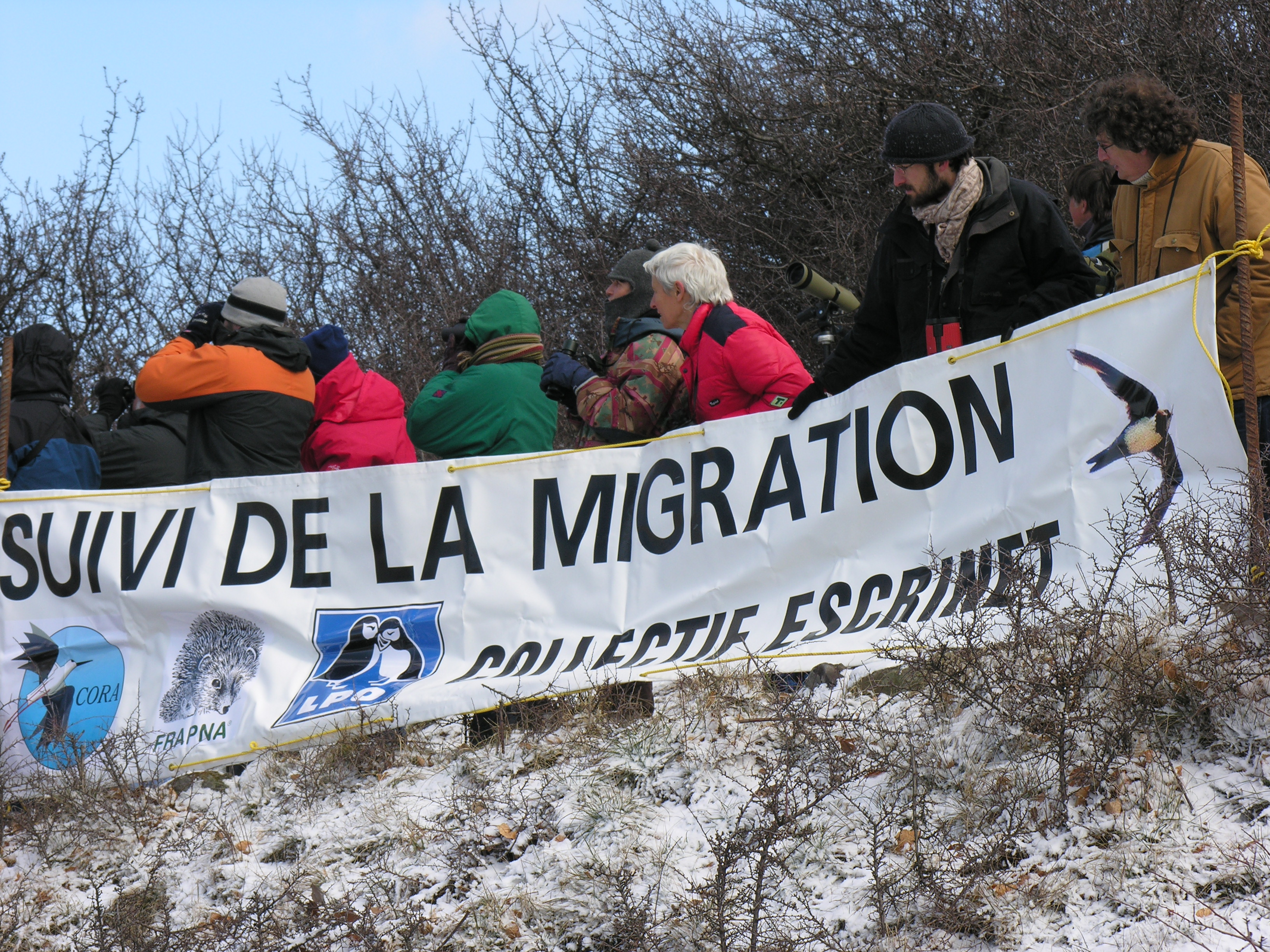 Suivi de la migration prénuptiale diurne des oiseaux au col de l'Escrinet (Ardèche, France) par les associations de protection de la nature dans des conditions météorologiques polaires. Mois de mars 2006.